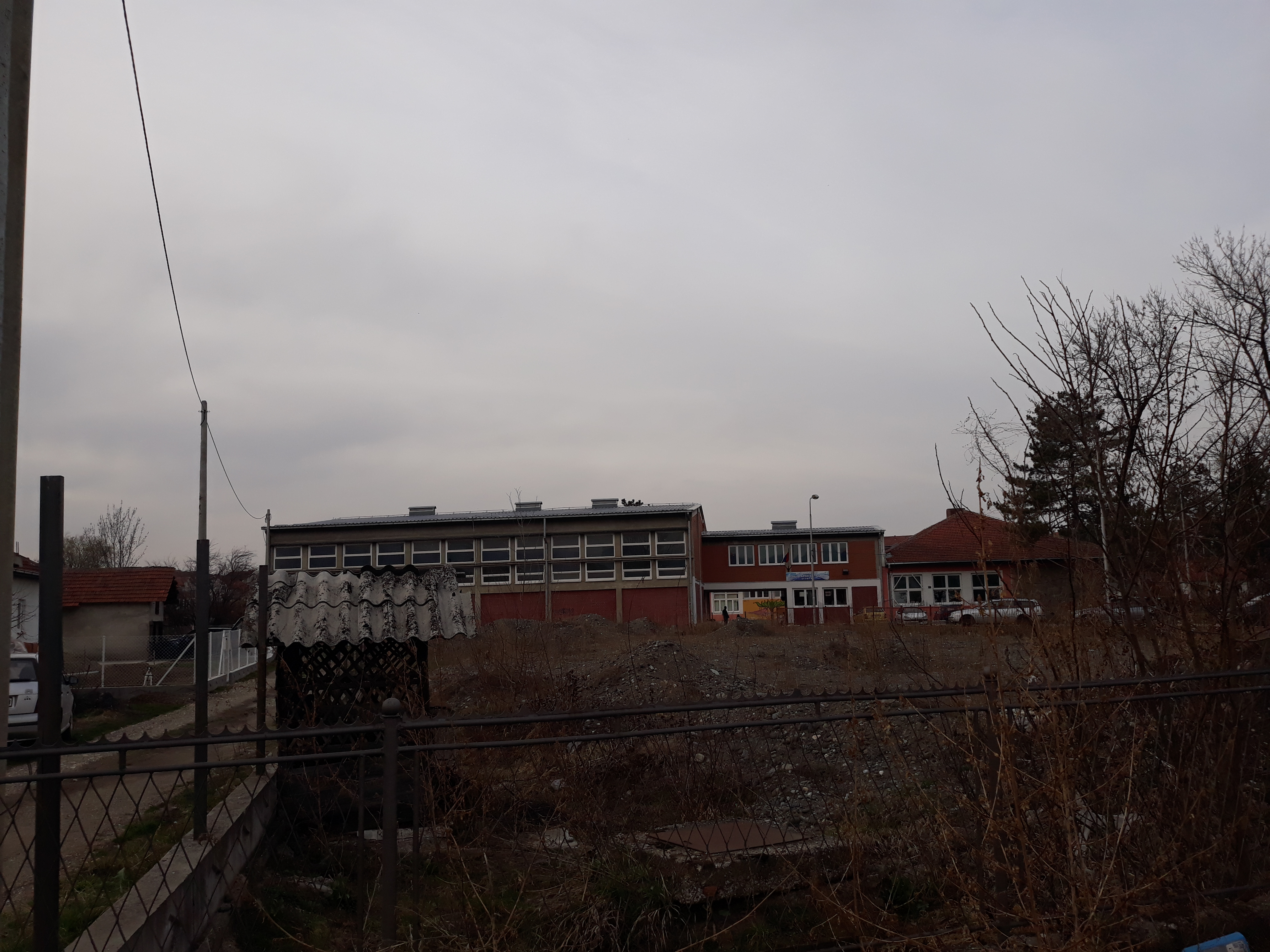 Основна школа „Чибуковачки партизани“ у Краљеву